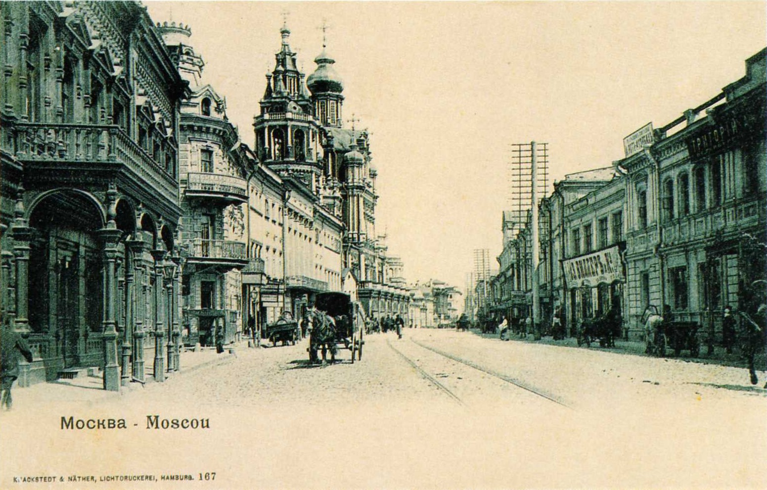 Церковь Успения Пресвятой Богородицы на Покровке